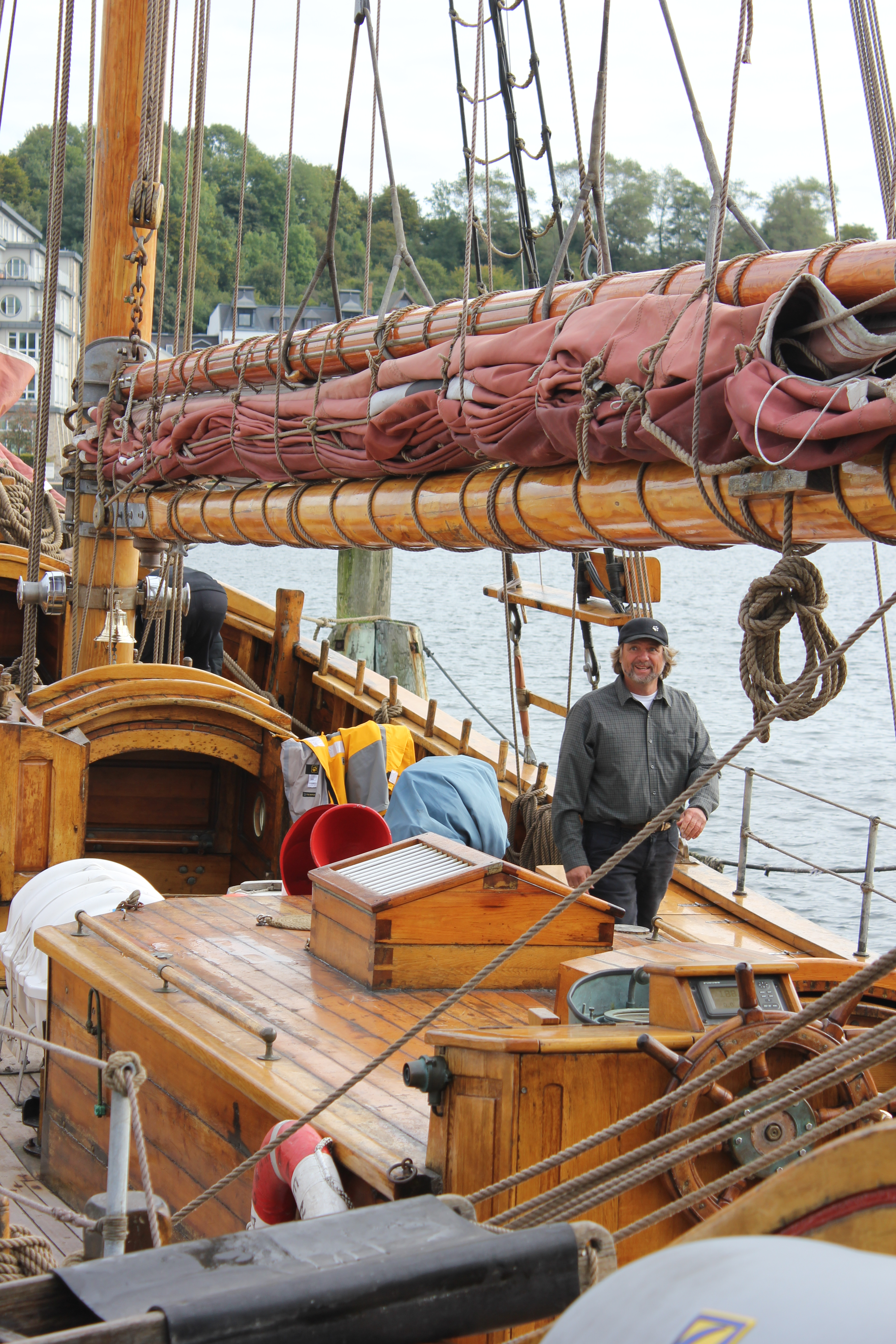 Arved Fuchs kehrt mit seinem Schiff Dagmar Aaen zurück zum Museumshafen in Flensburg (2013), Bild 01